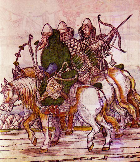 Дворянская конница (дети боярские) XVI в. Раскрашенная гравюра (к изданию книги барона Сигизмунда фон Герберштейна «Записки о Московии»)